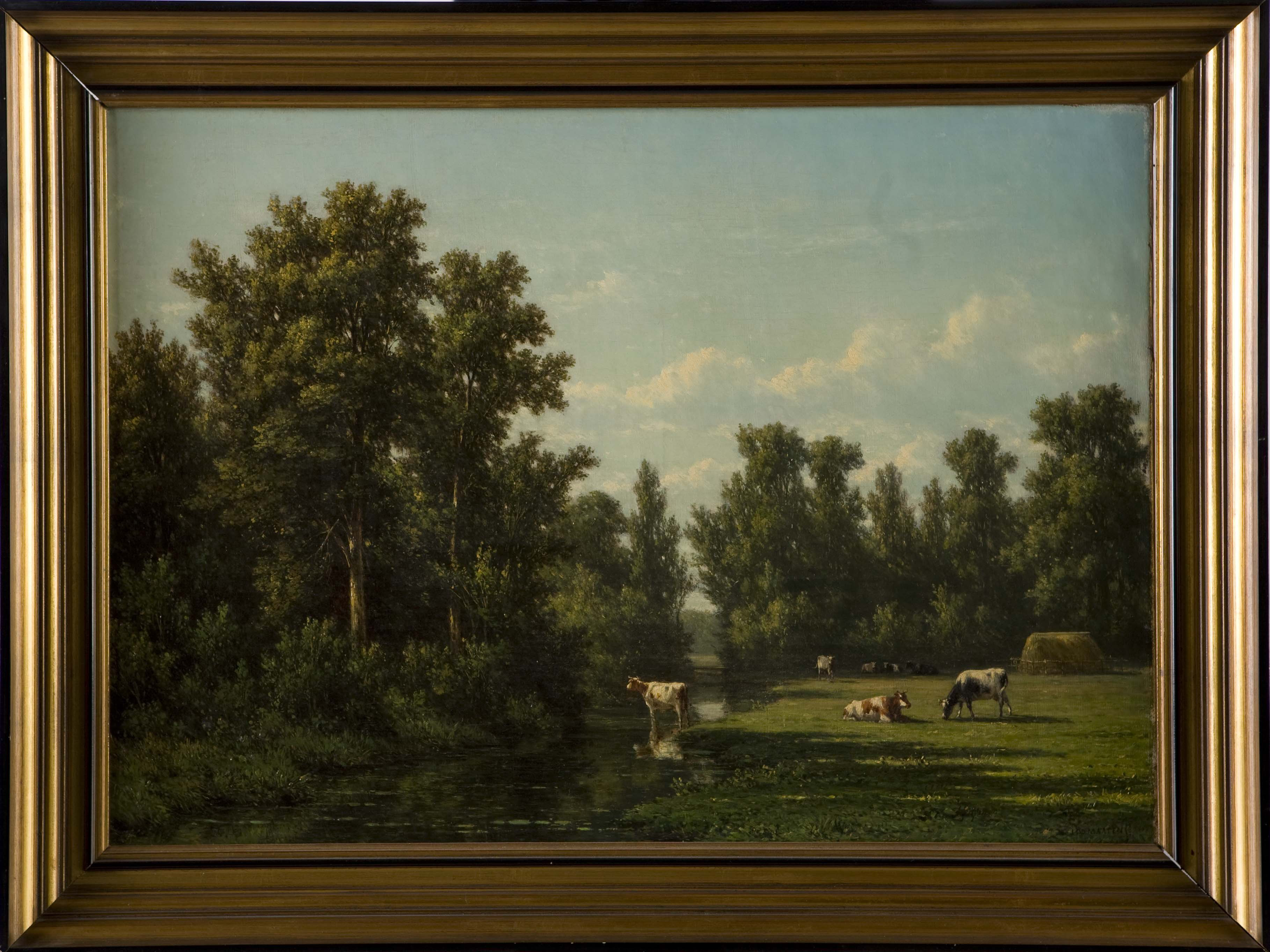 J.J. van der Maaten